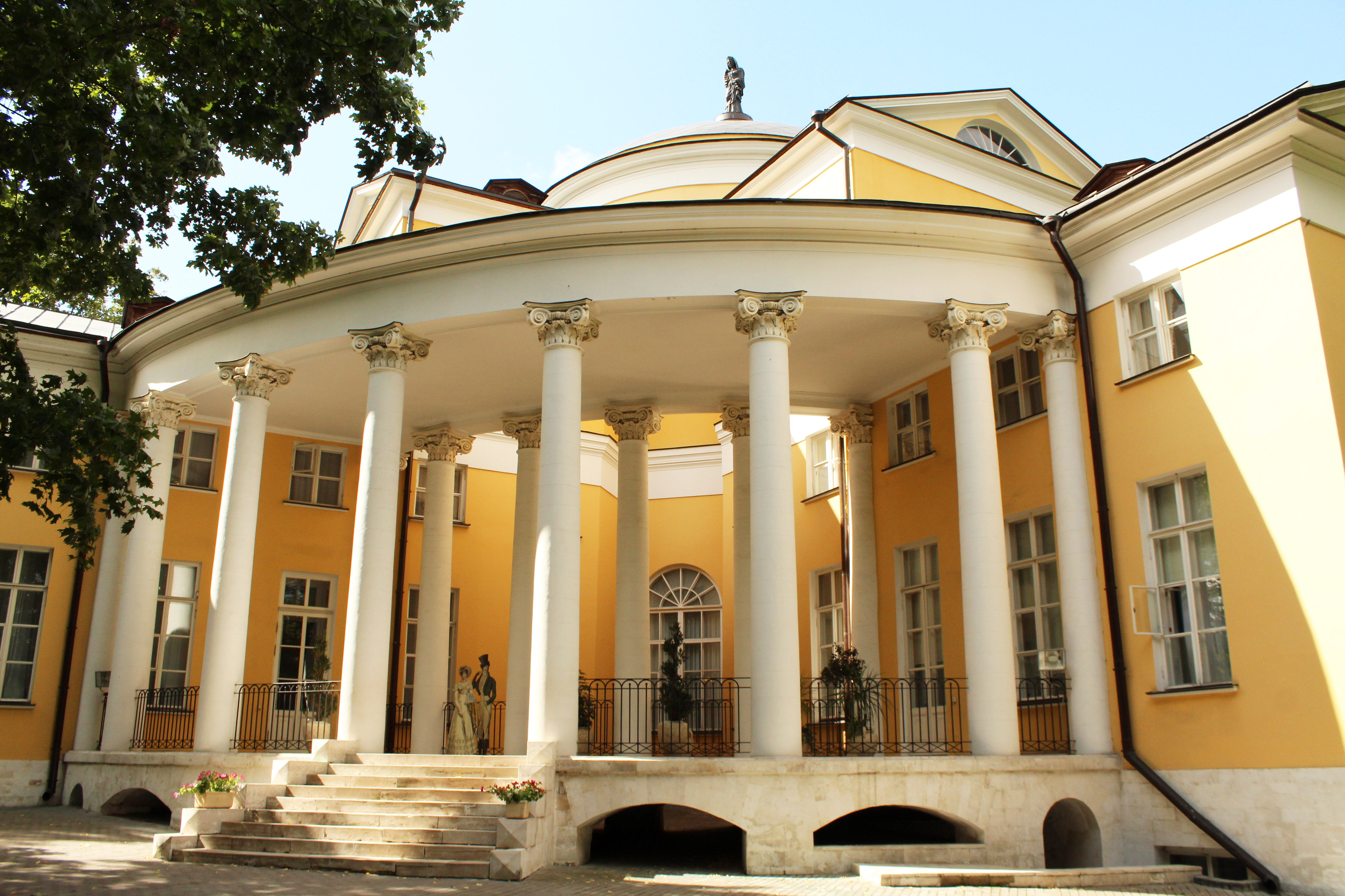 Дворец: Летняя ул., дом 1, строение 1, Люблино, Юго-Восточный округ, Москва